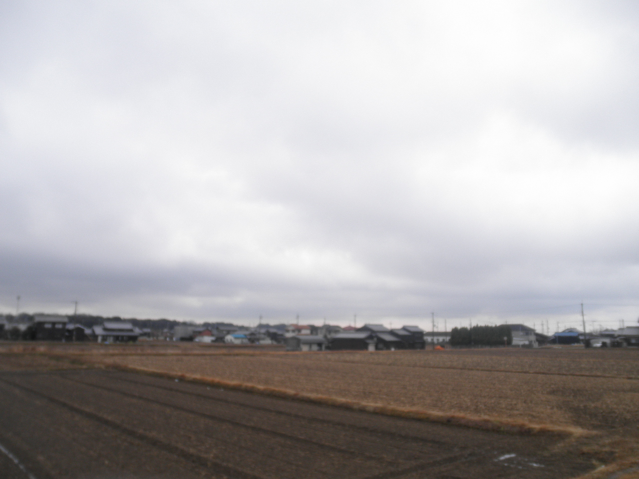 兵庫県加古郡稲美町加古